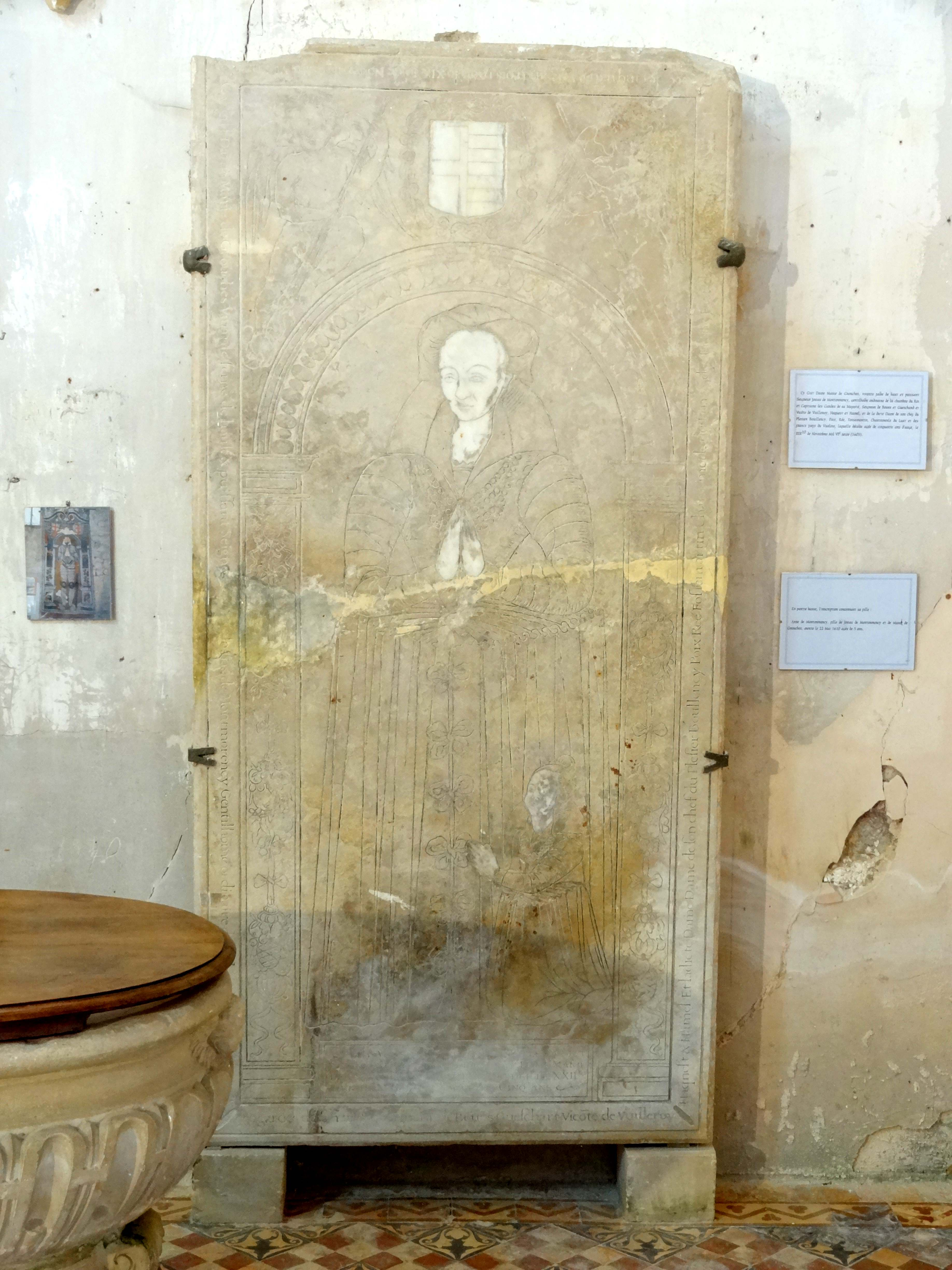 Dalle funéraire à effigie gravée de Marie de Grouches, morte le 19 novembre 1605, et d'Anne de Montmorency, sa fille, morte le 22 mai 1610 à l'âge de 10 ans.